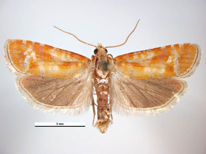 Rhyacionia buoliana male